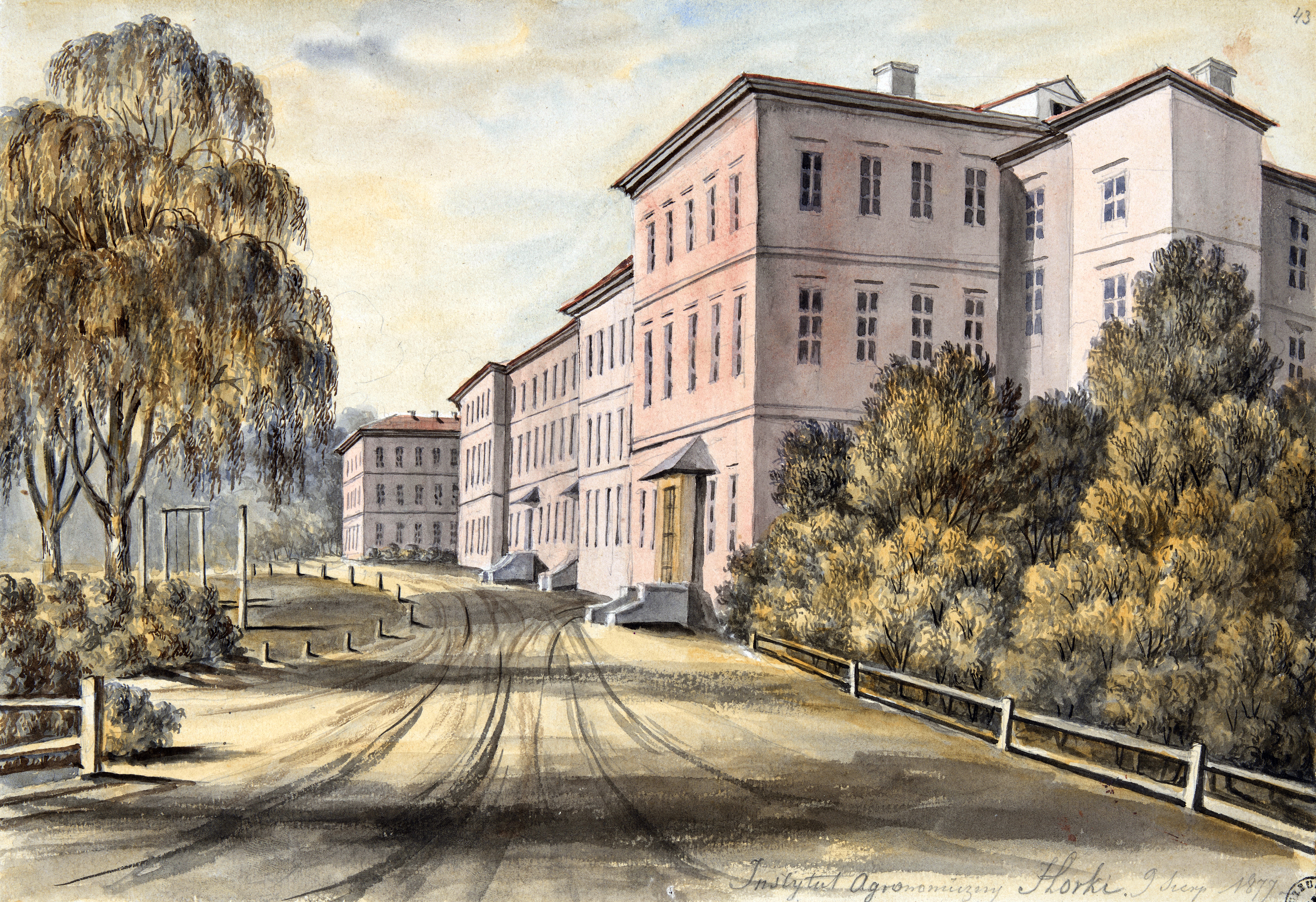 Беларуская (тарашкевіца): Горкі (Horki). Сельскагаспадарчая акадэмія